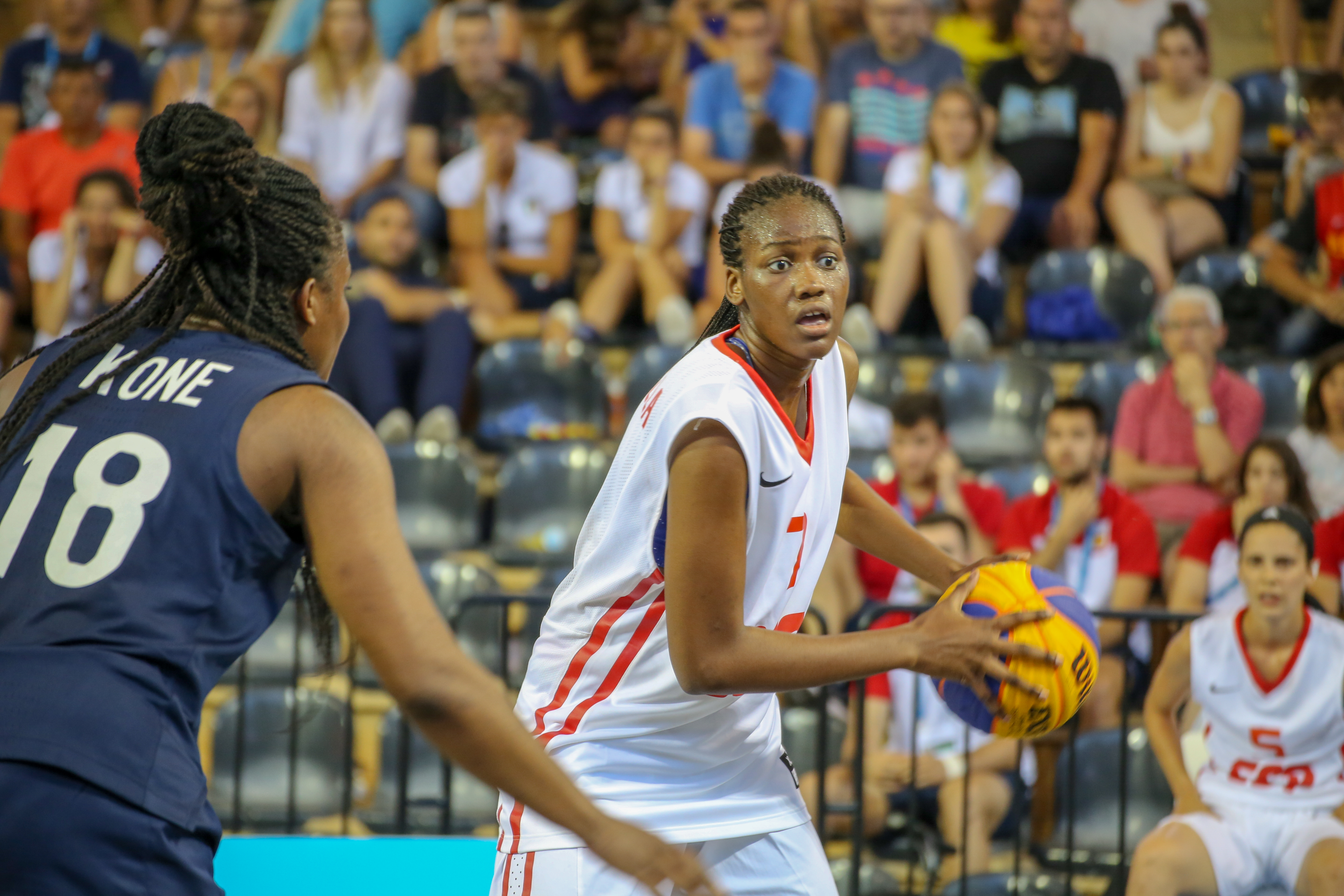 Nogaye Lo Silla jugando en los Juegos del Mediterráneo 2018